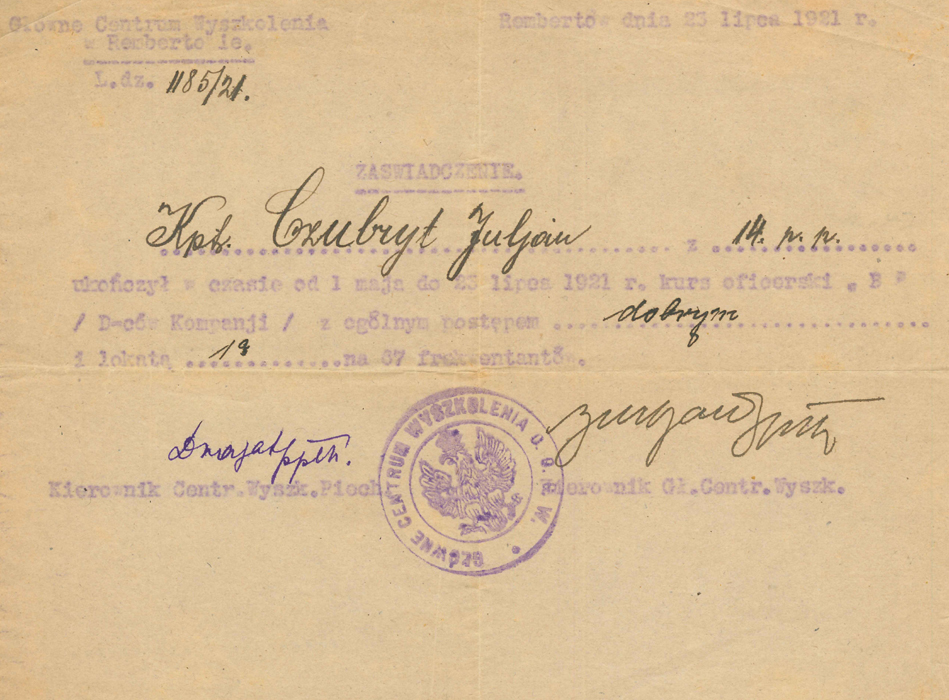 Zaświadczenie o ukończeniu kursu w rembertowskim Głównym Centrum Wyszkolenia